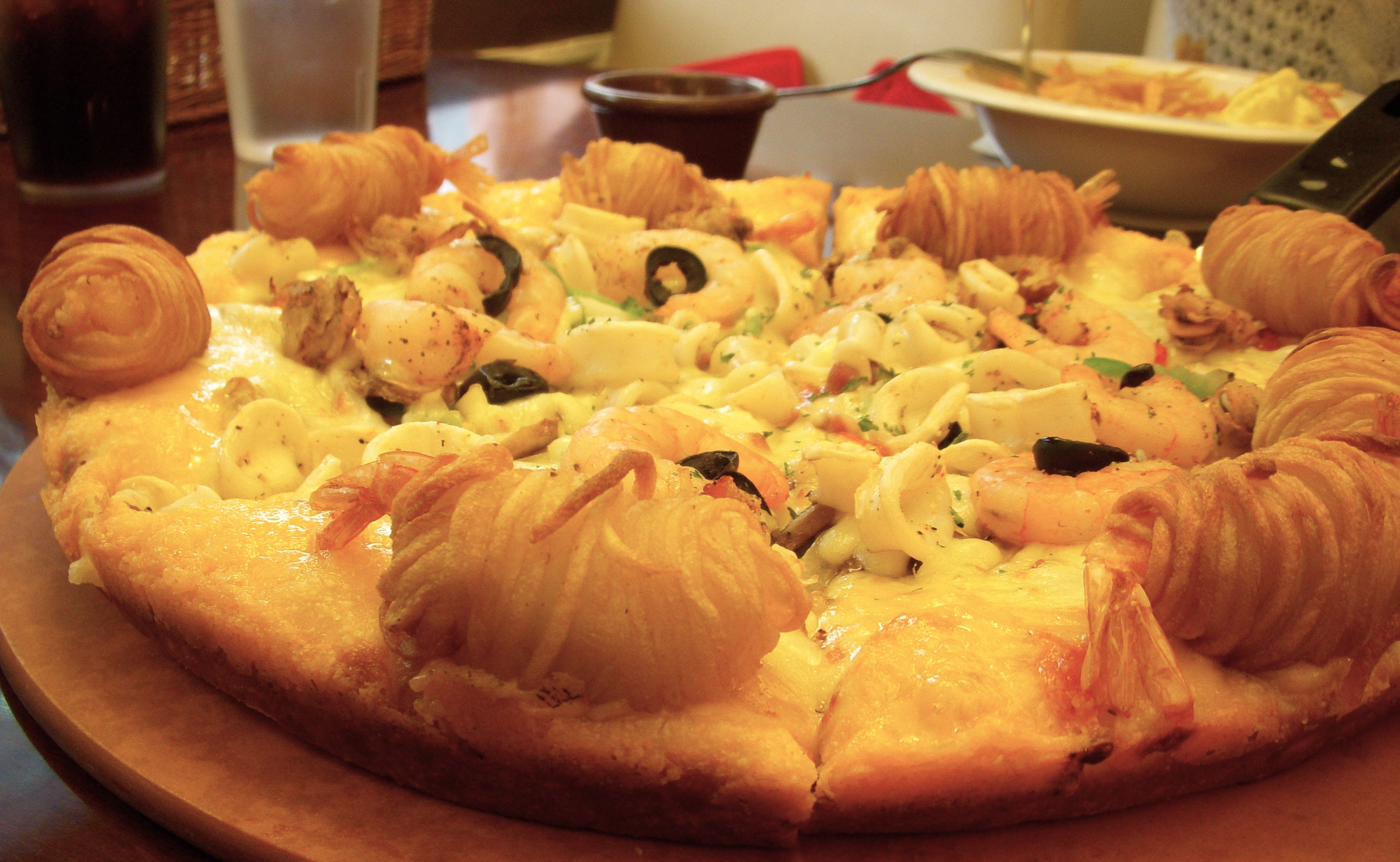 Mr. Pizza, Seoul, Korea - small seafood pizza costs around US $23.